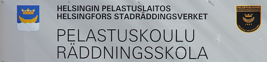 Pelastuskoulun kyltti Helsingin Etelä-Haagassa.